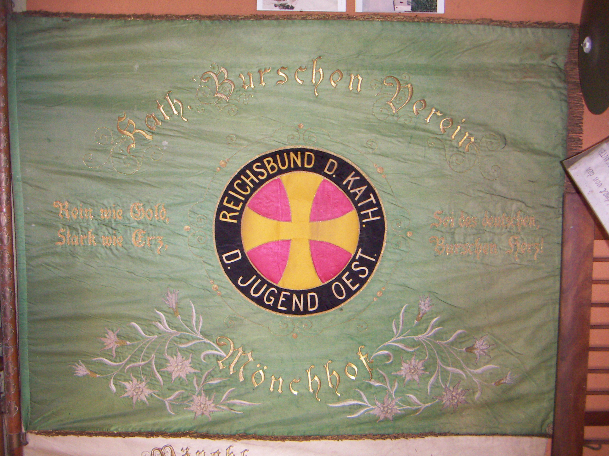 Fahne der röm. kath. Jugendorganisation Reichsbund in Mönchhof, 1934-38, Austrofaschismus, Ständestaat, Dorfmuseum Mönchhof Burgenland